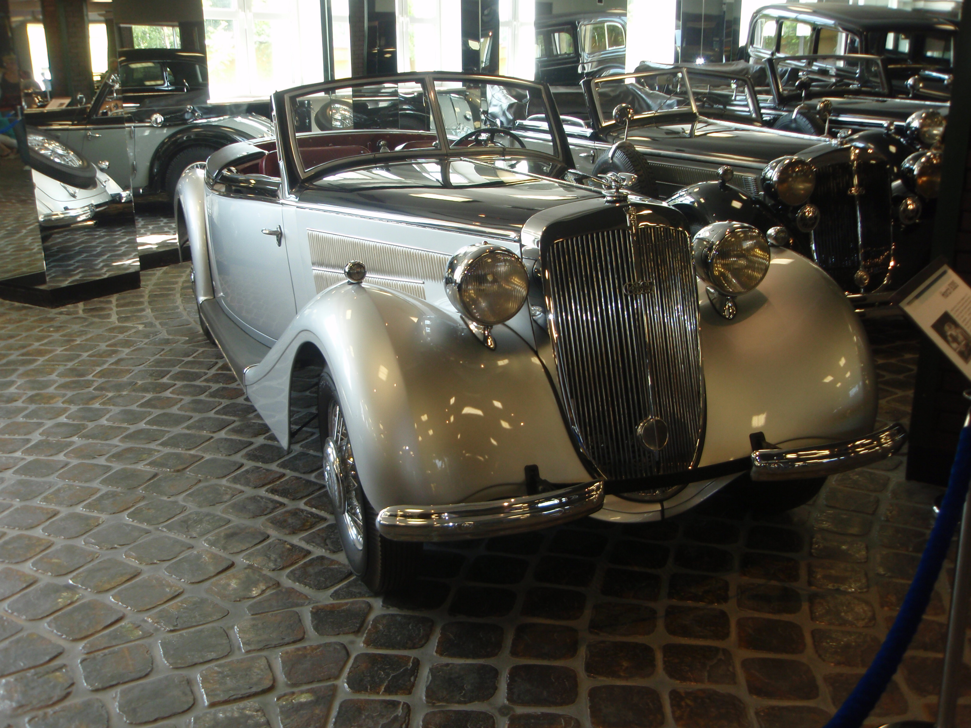 Автомобиль Horch 930S